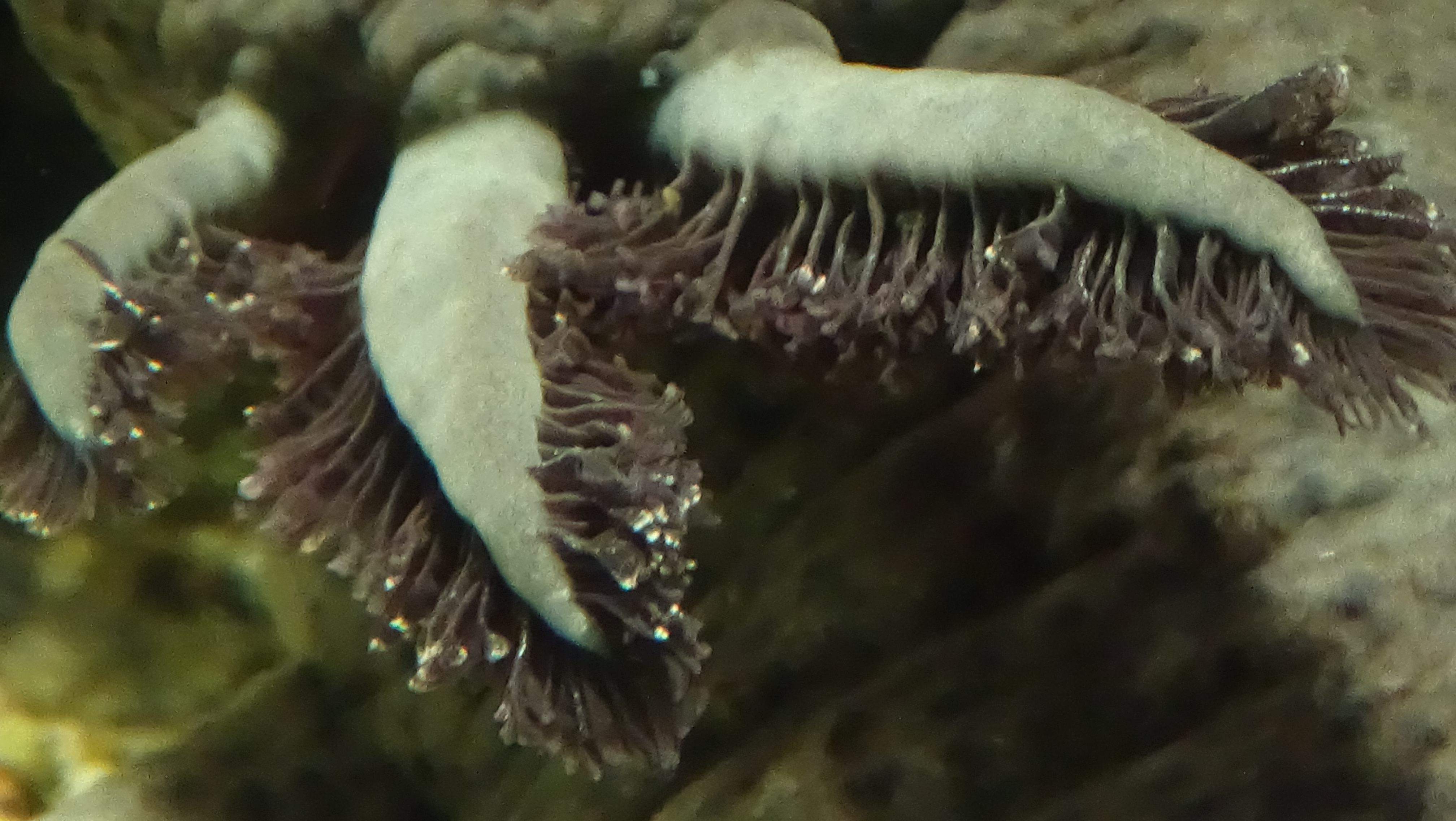 Ambystoma mexicanum- triton du mexique wiki14